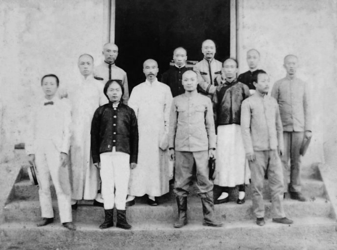 吴殿英、吴稚英父子1898年在湖北练新军时期照。二排中立者吴殿英，左一吴稚英，后排右二庄蕴宽。